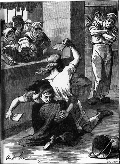 Illustration of Émile Zola's L'Assommoir